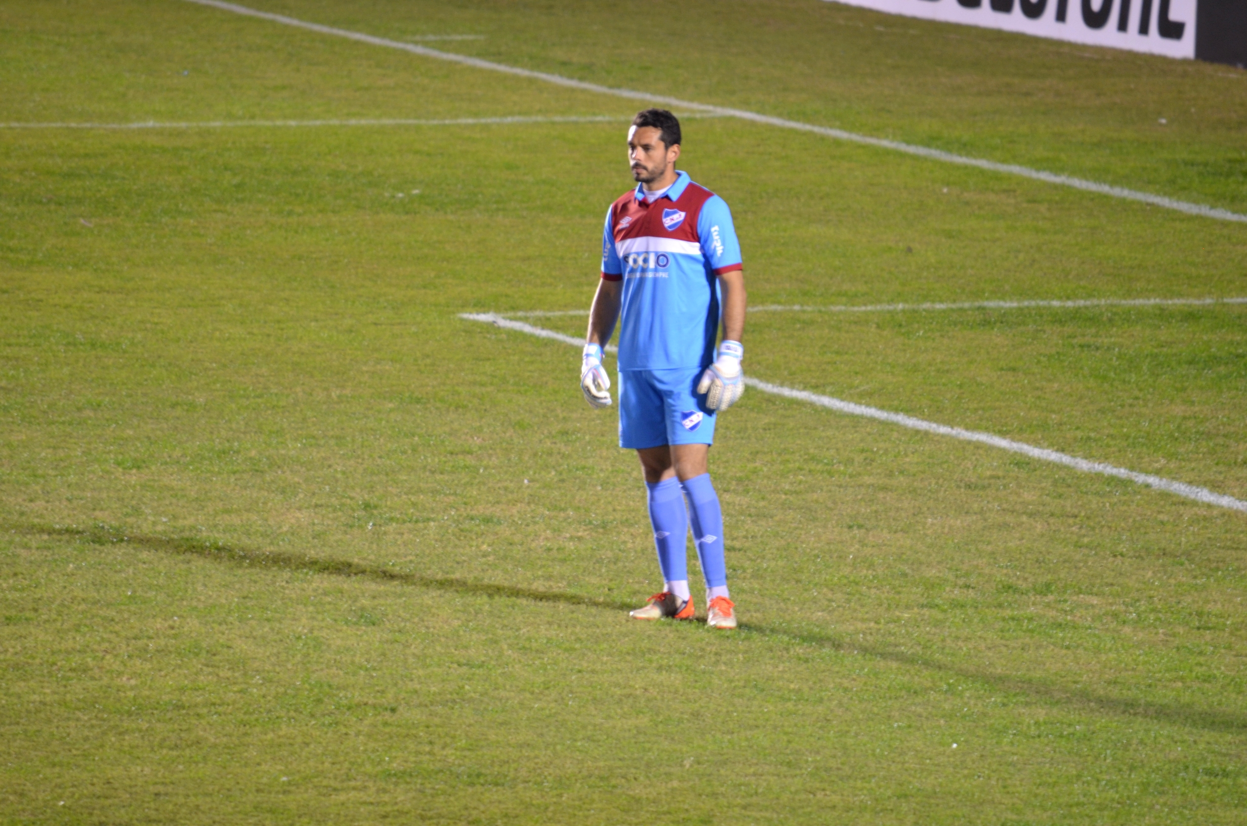 Imagen del partido disputado entre Nacional y Boca Juniors, en el estadio Gran Parque Central, por los cuartos de final de la Copa Libertadores 2016